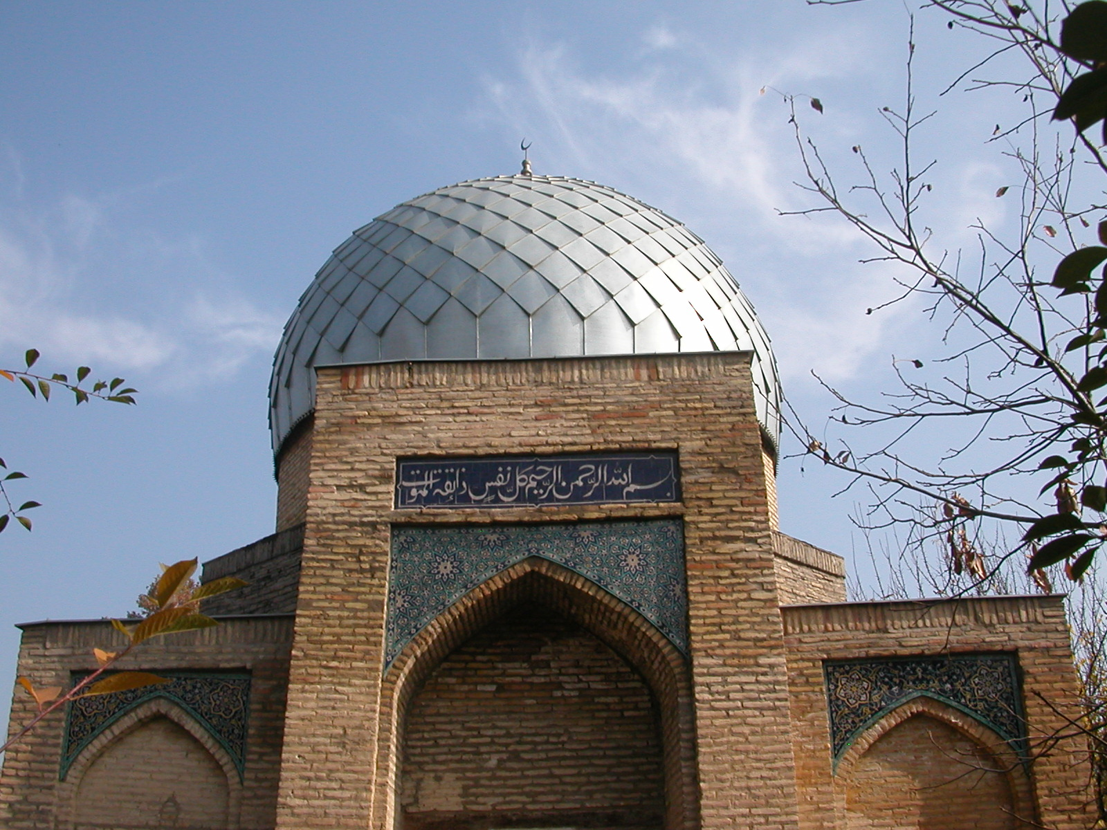 אחוזת קבר של שייח חשוב בשייכטנאור מימי הביניים בטשקנט